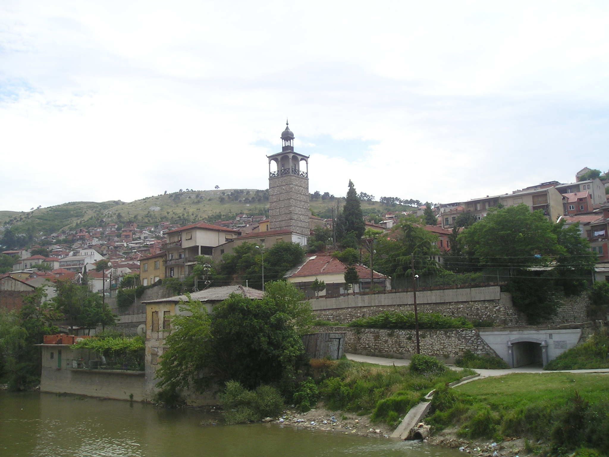 Clock tower in Veles, R.o.Macedonia Prawy brzeg Wardaru i wieża zegarowa w mieście Veles, Macedonia Велес на десниот брег на Вардар со познатата Саат-Кула, Македонија